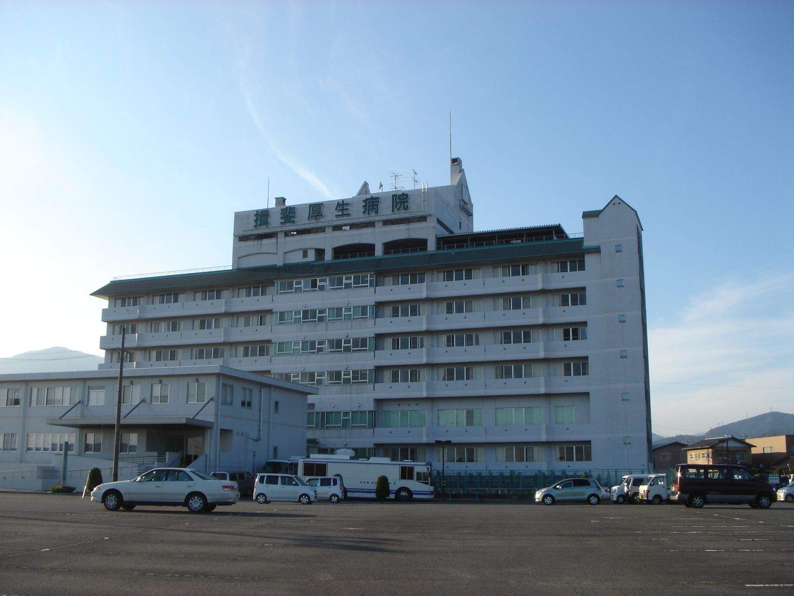 Ibi Kosei Hospital（揖斐厚生病院）,Ibigawa,Gifu,Japan(岐阜県揖斐川町)で撮影。